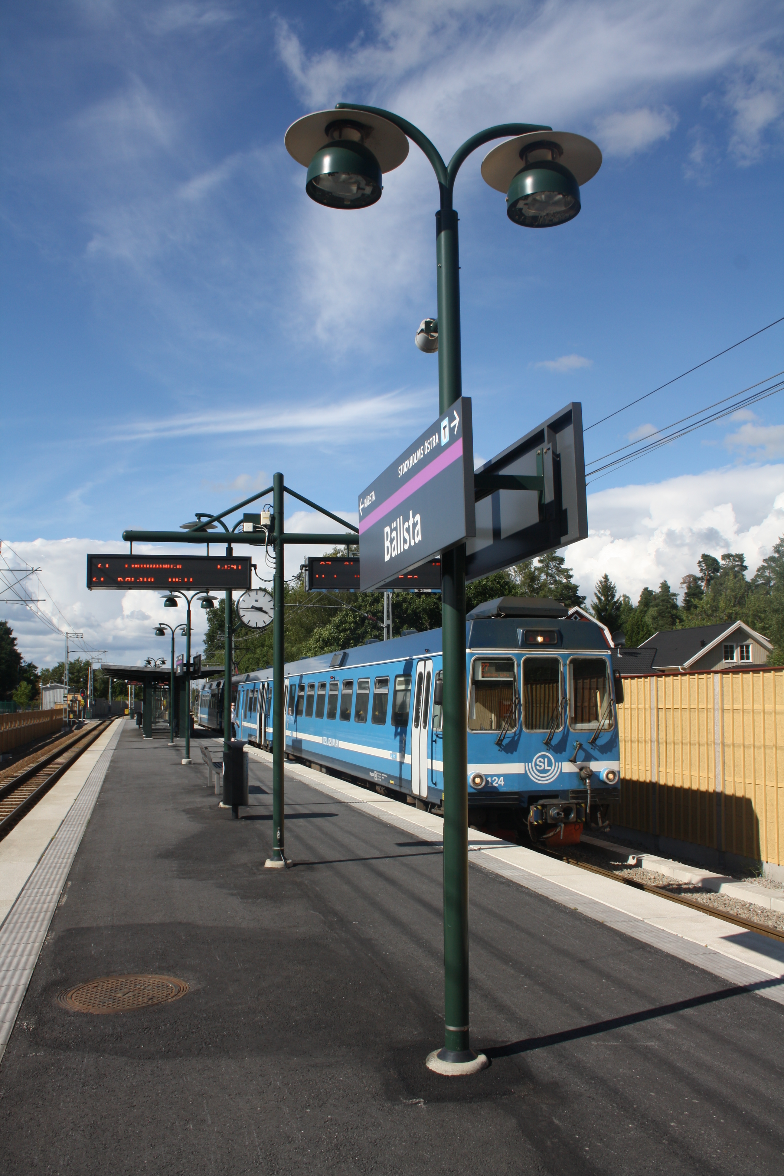 X10p i Bällsta